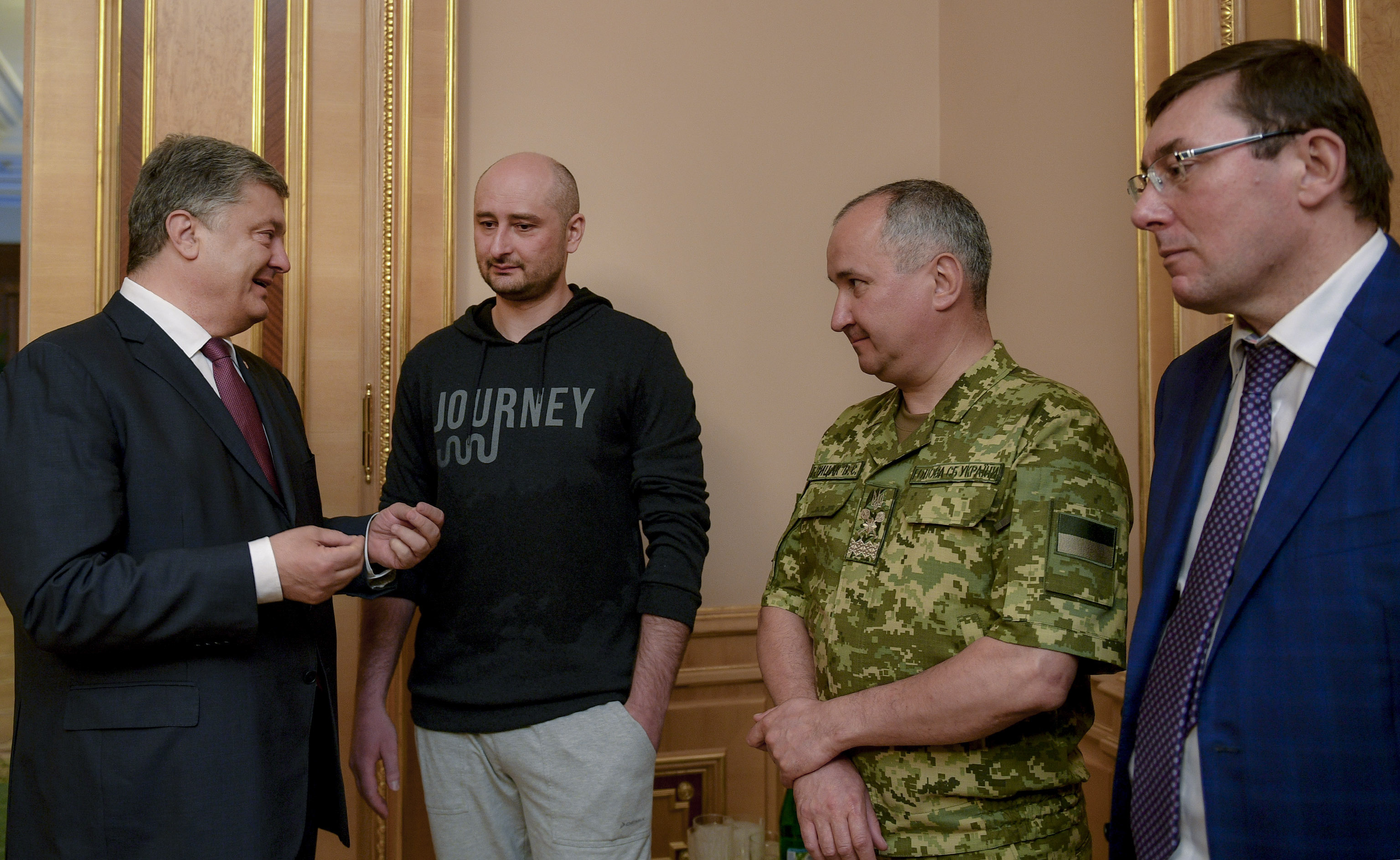 Президент України Петро Порошенко зустрівся з журналістом Аркадієм Бабченком